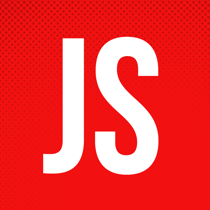 Logo Juventud Socialista de Argentina